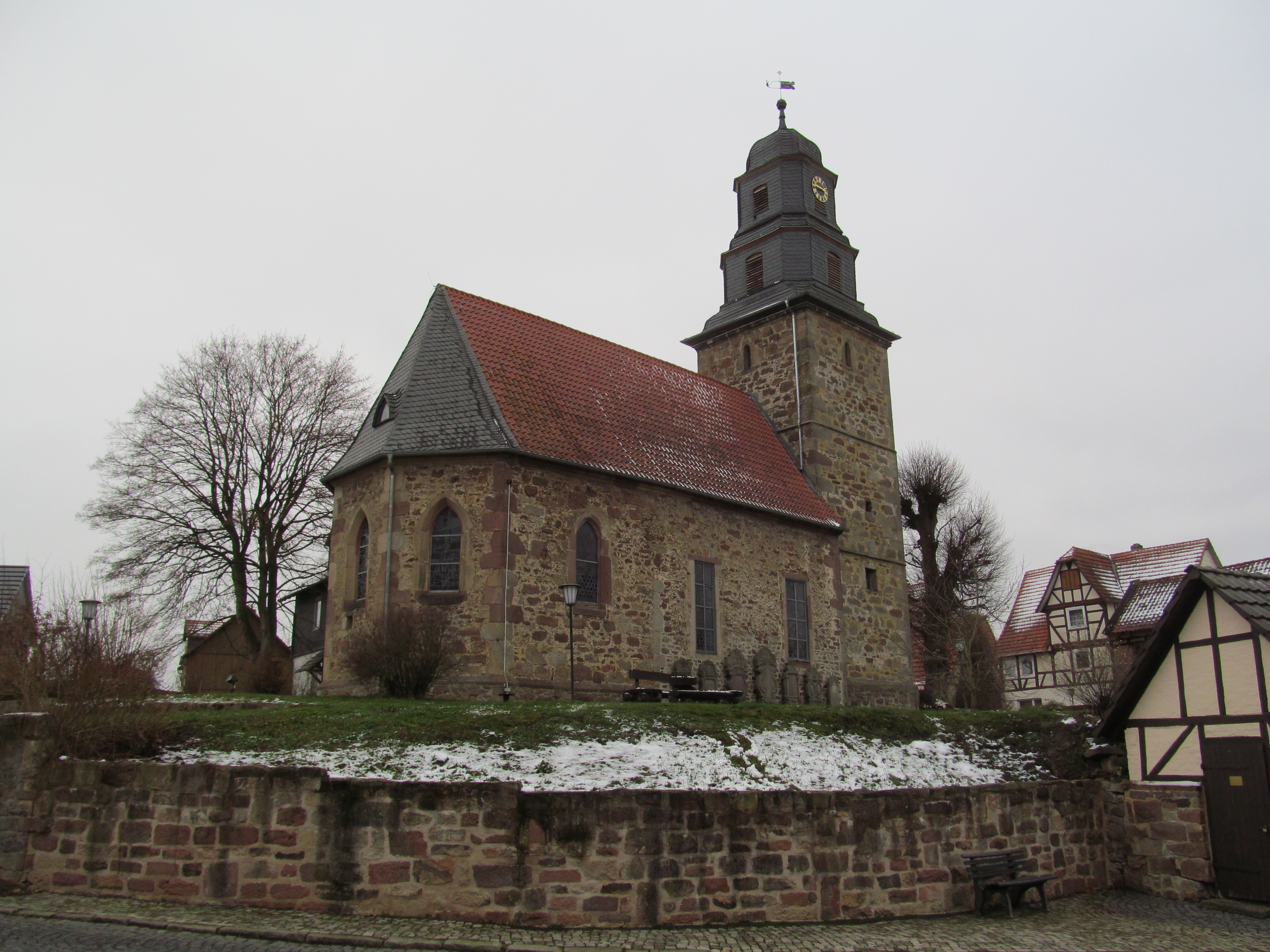 die evangelische Kirche von Fürstenhagen